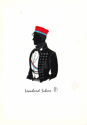 Scherenschnitt von Gregor von Scherr als Aktiver der Palatia. Hier mit dem Taufnamen Leonhard Andreas Scheer.